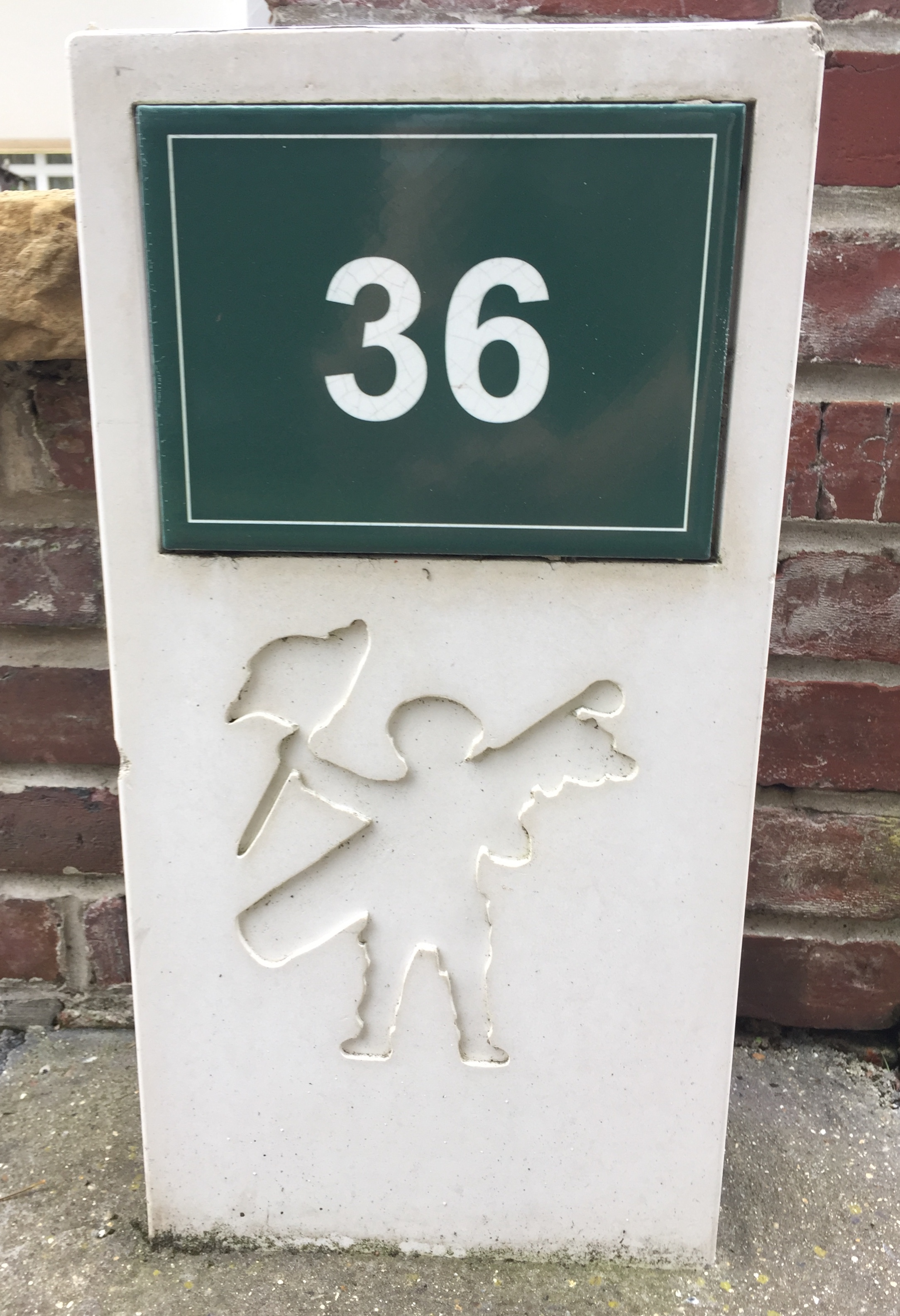 Borne en béton, avec la numérotation et le caddy, installée en forêt du Touquet-Paris-Plage depuis 2015.